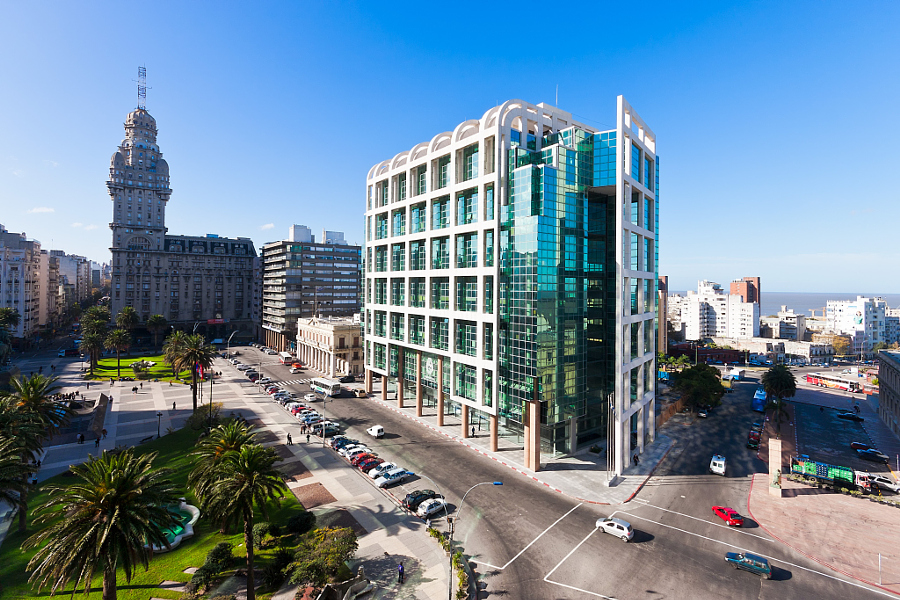 Исполнительная башня, резиденция президента Уругвая